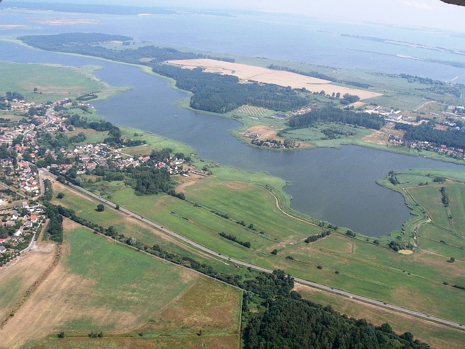 Luftbildaufnahme von Pruchten